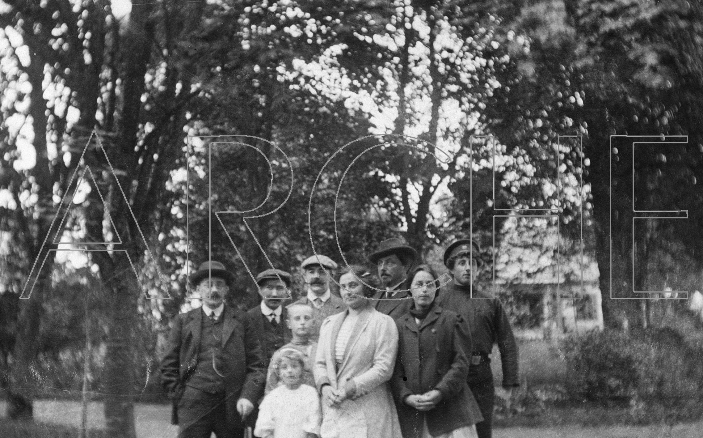 Супрацоўнікі рэдакцыі «Нашай Нівы» разам з сям’ёй Мэнке падчас вандроўкі па ваколіцах Вільні. Злева направа стаяць: Антон Грыневіч, Іван Луцкевіч, Лявон і Вольга Мэнке, Аляксандр Уласаў, Мэнке-маці, Кароль Мэнке-бацька, Юльяна і Люцык (Алойз) Мэнке. Вільня, вясна 1915 г. З фондаў БДАМЛМ